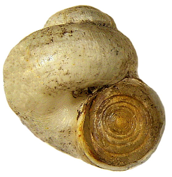 Familie: Valvatidae Groesse: 5 x 5 mm Verbreitung: Europa Ökologie: lebt in der Uferzone großer Seen Fundort: Germania, Oberbayern, Bodensee leg.det. U.Schmidt, 1971 Photo: U.Schmidt, 2007